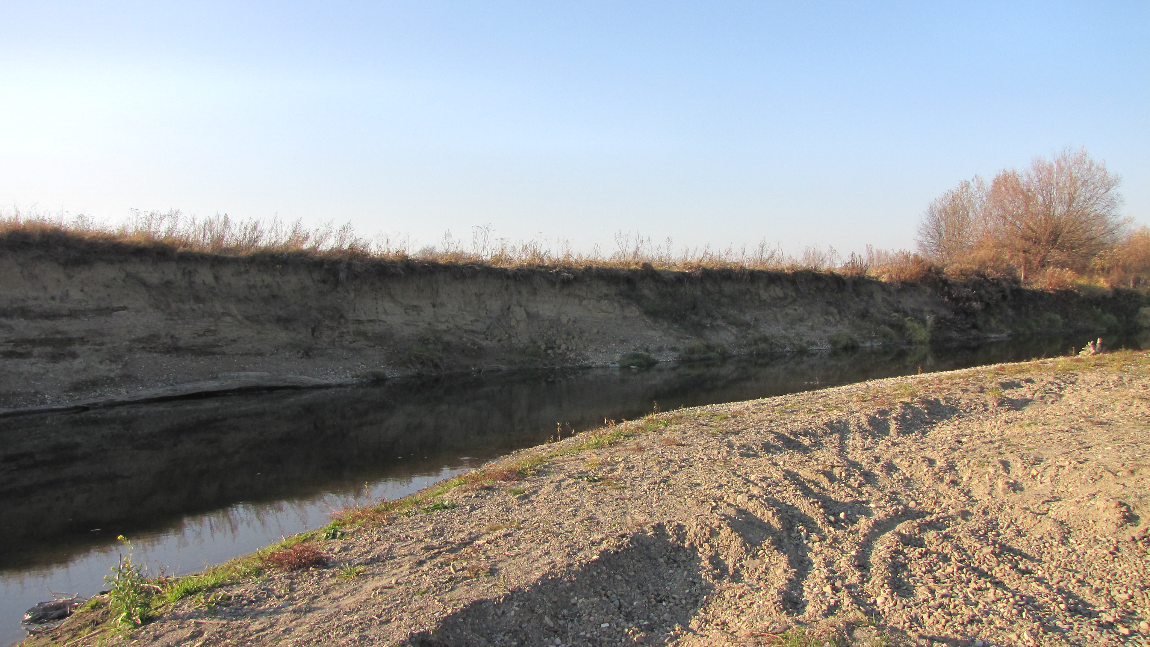 Klasyczny meander ze skarpą i łachą , na rzece Jasiołka na wysokości miejscowości Gliniczek